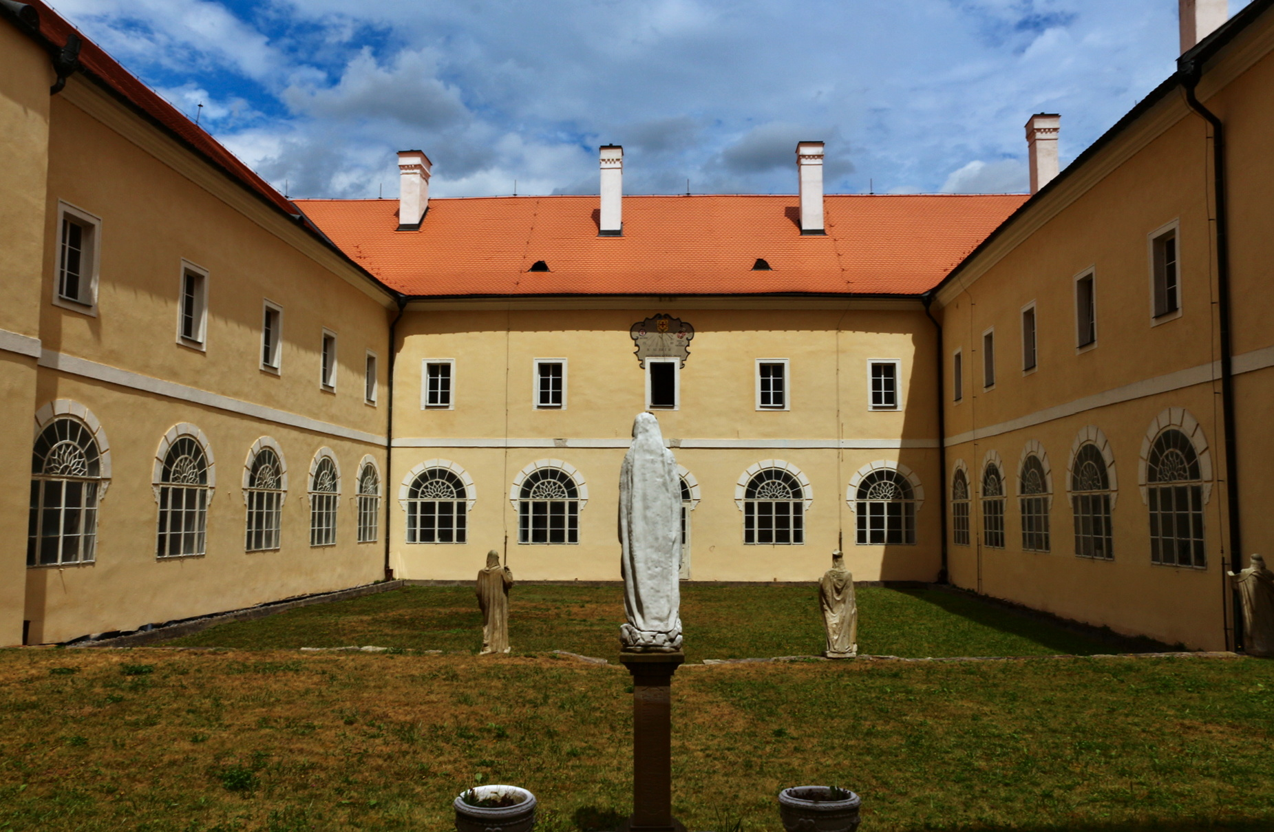 Klášter Nová Říše